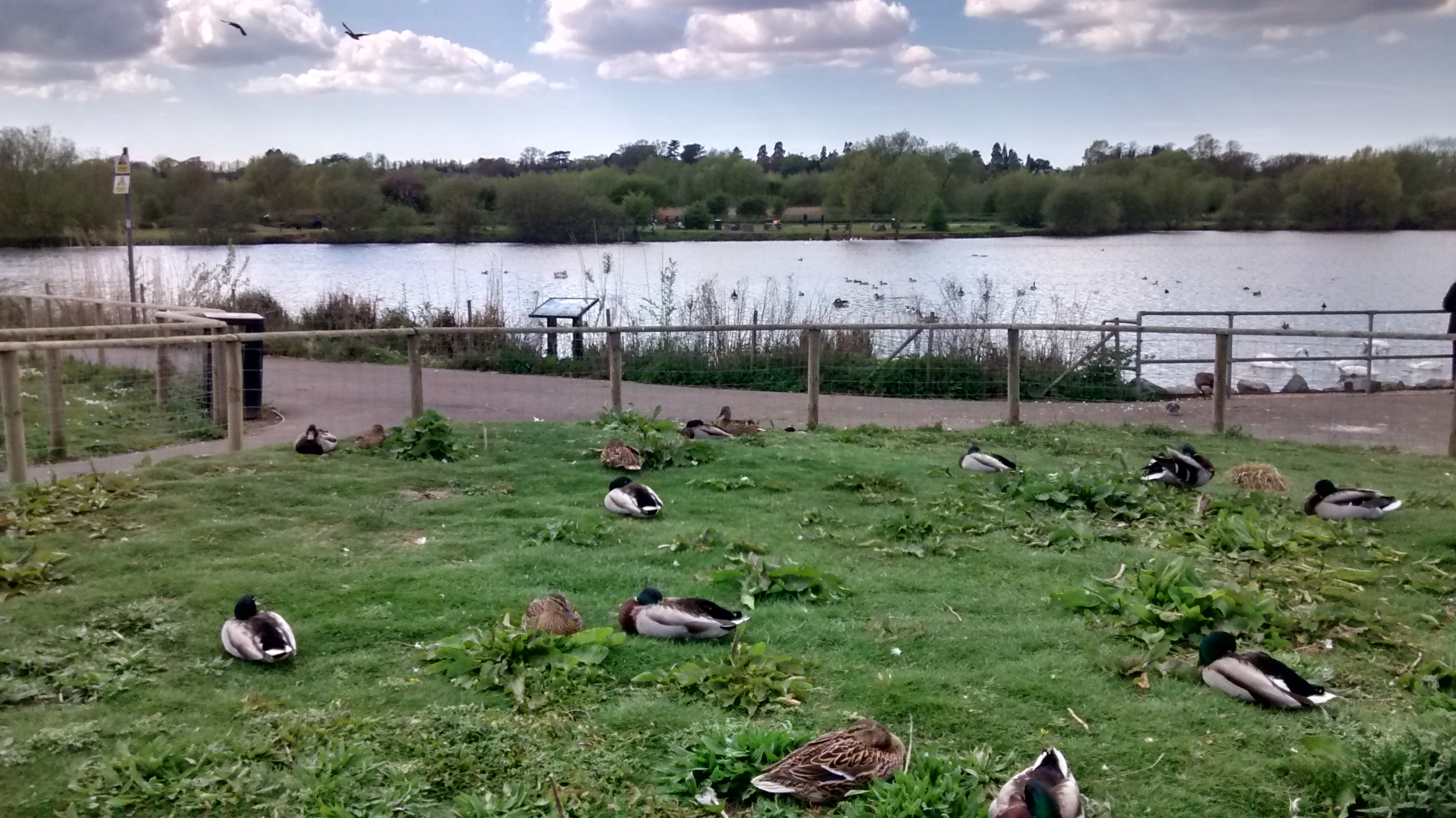 Practwo w Watermead Country Park